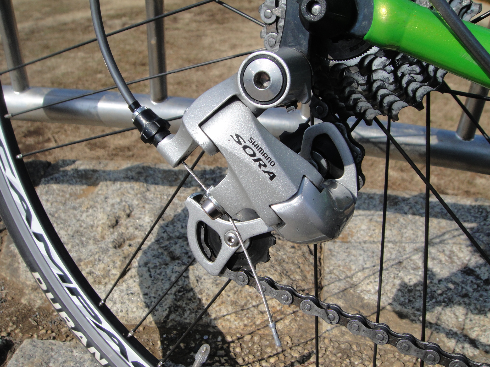 SHIMANO製 SORA 3400シリーズのリアディレイラー